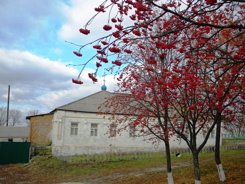 Здание, в котором временно размещался храм Вознесения Господня с 06.01.1999 - по 20.11.2014 г.